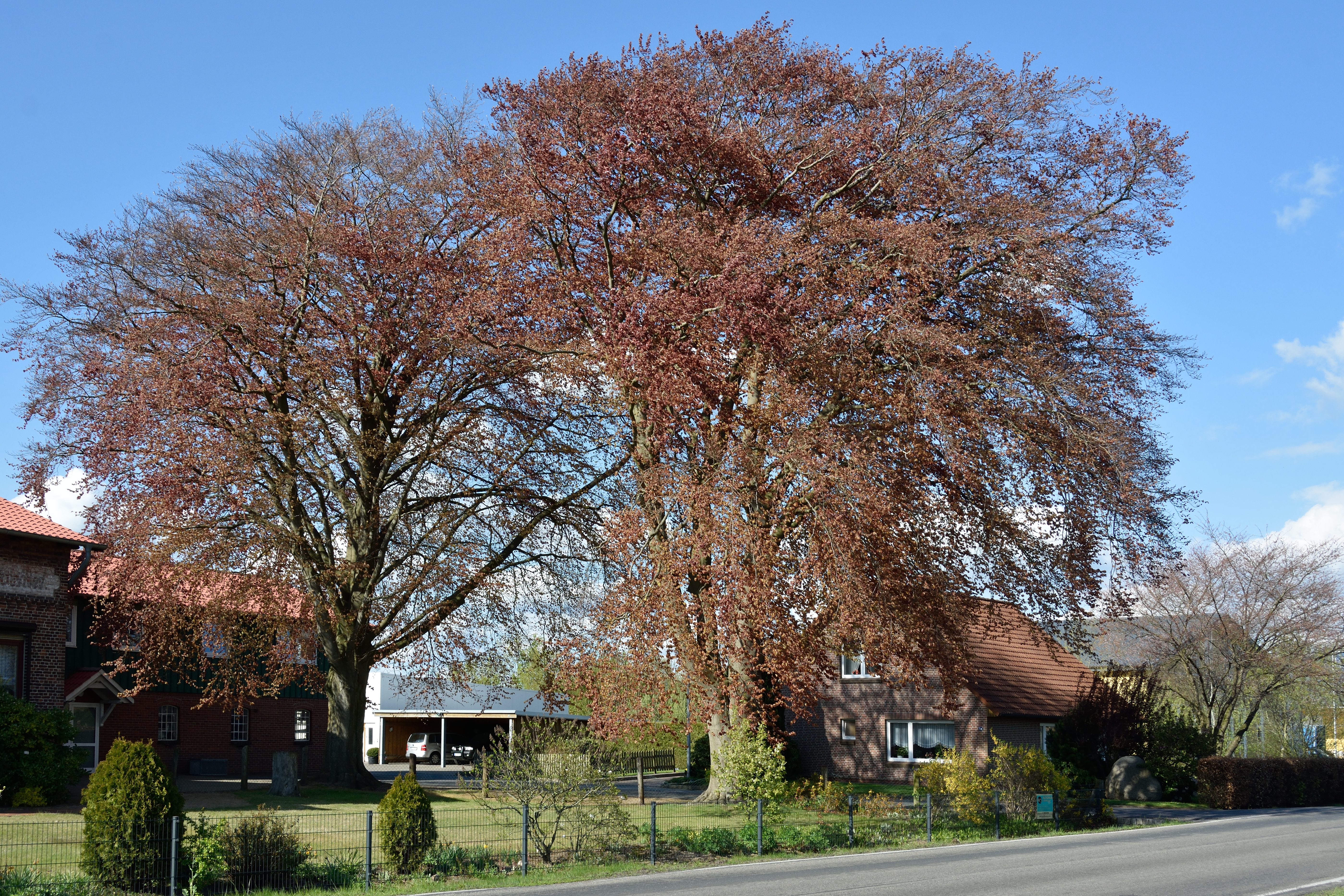 Naturdenkmal im Kreis Pinneberg 2 Blutbuchen, Heede, Hoffnunger Chaussee 1